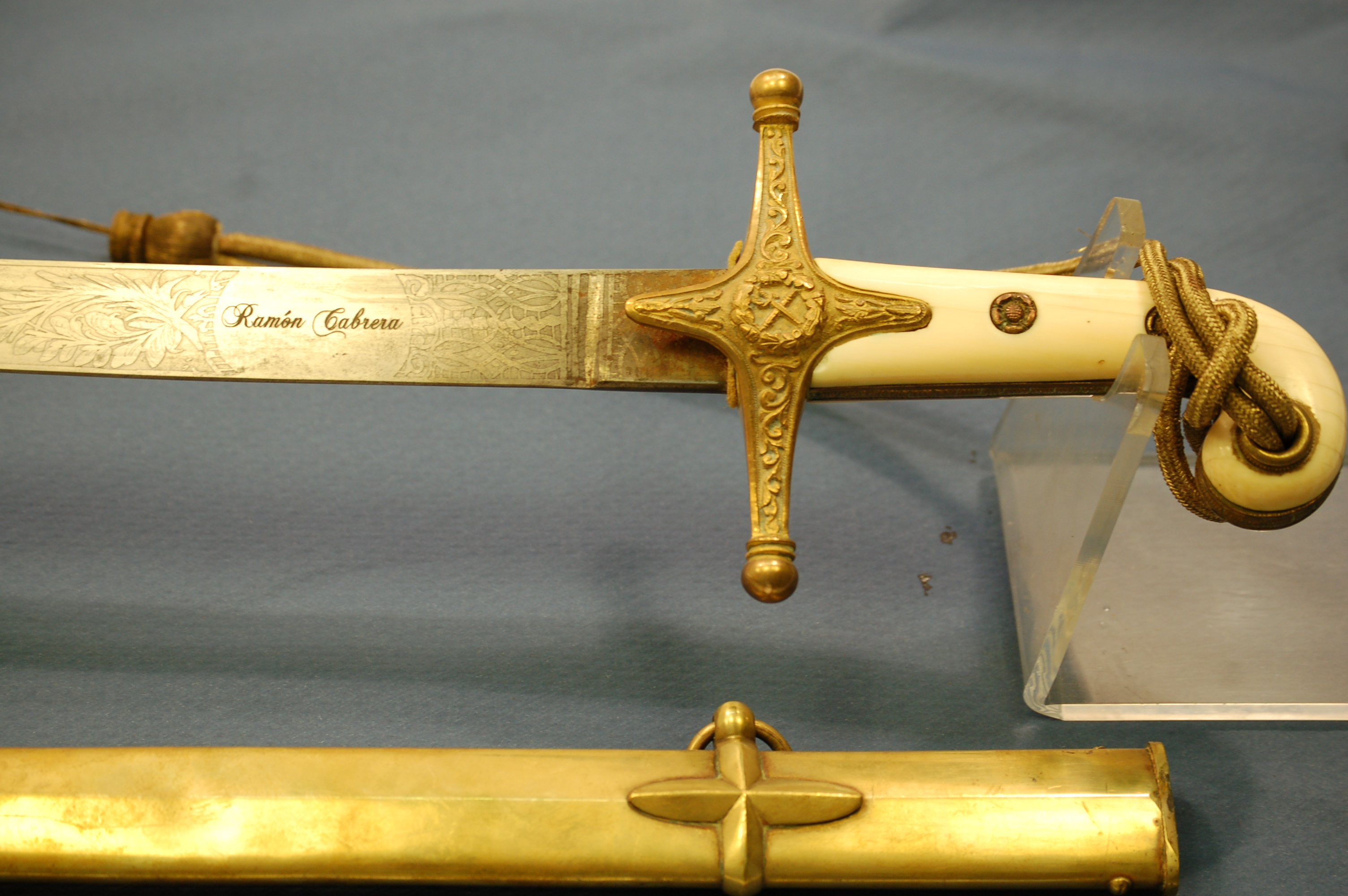 Espada del General Ramón Cabrera, obsequio de Carlos VI